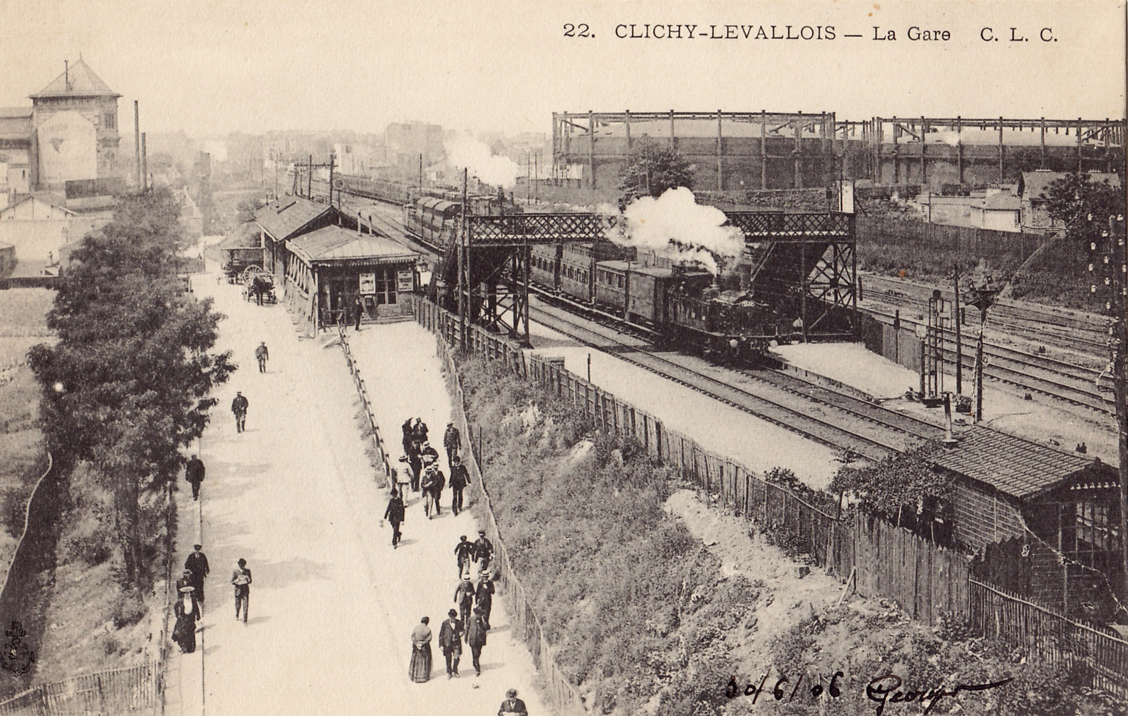 Carte postale ancienne éditée par CLC, n°22 :CLICHY - LEVALLOIS - La Garex²